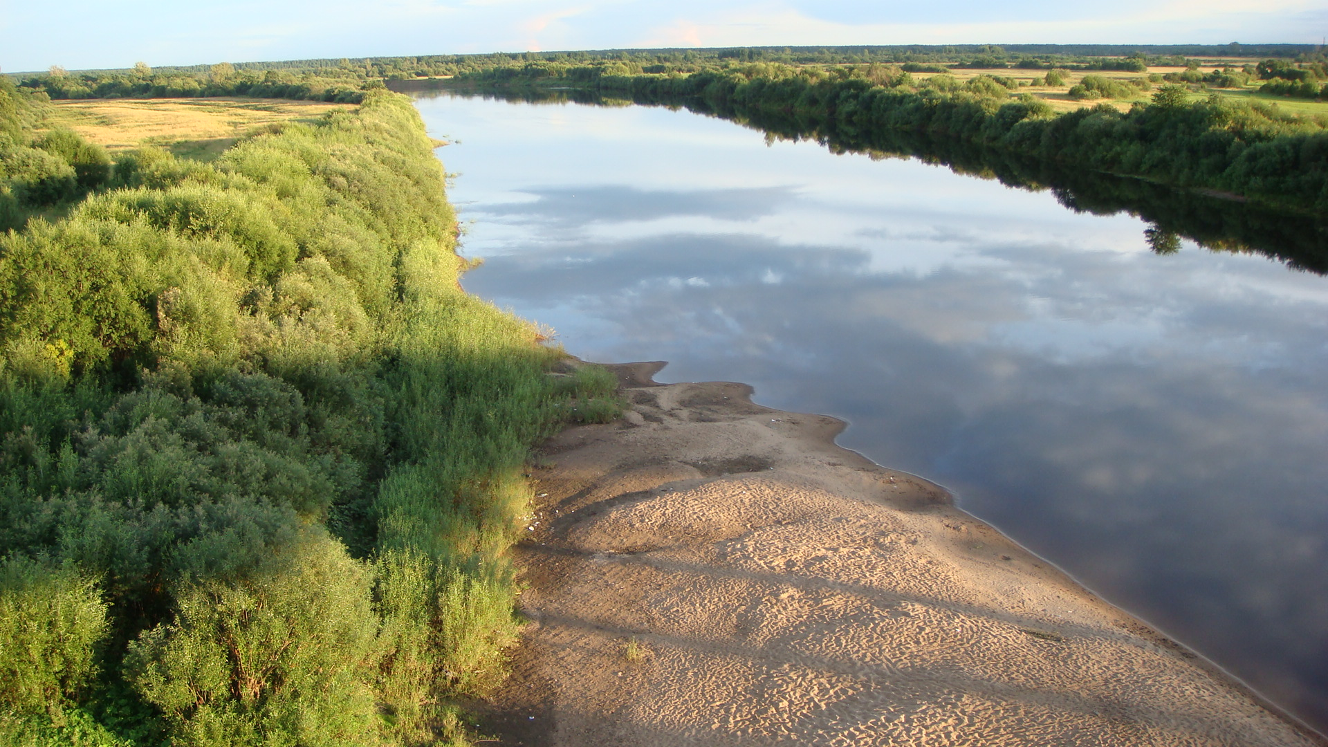 Вид на Унжу с автомобильного моста по трассе на Шарью